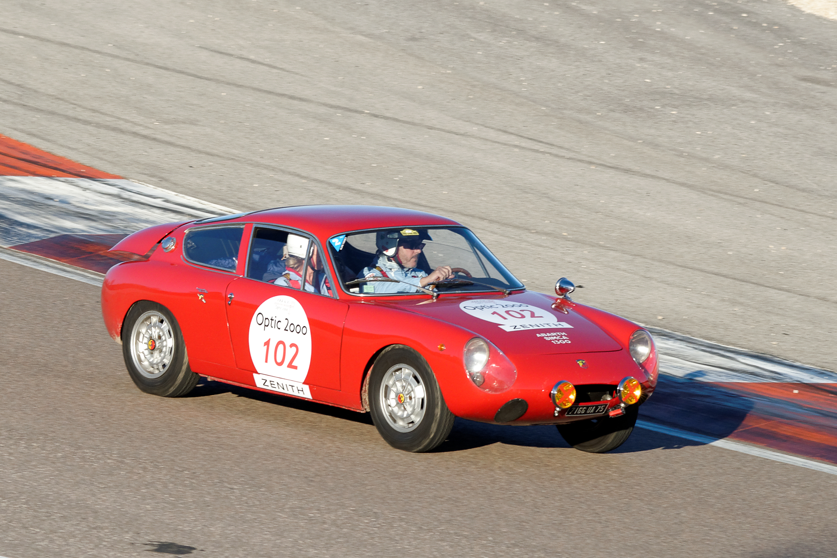 Abarth Simca 1300 GT 1963 - Tour Auto Optic 2000, année 2016 - Étape sur le circuit de Dijon-Prenois (Côte d'Or, Bourgogne-Franche-Comté, France).